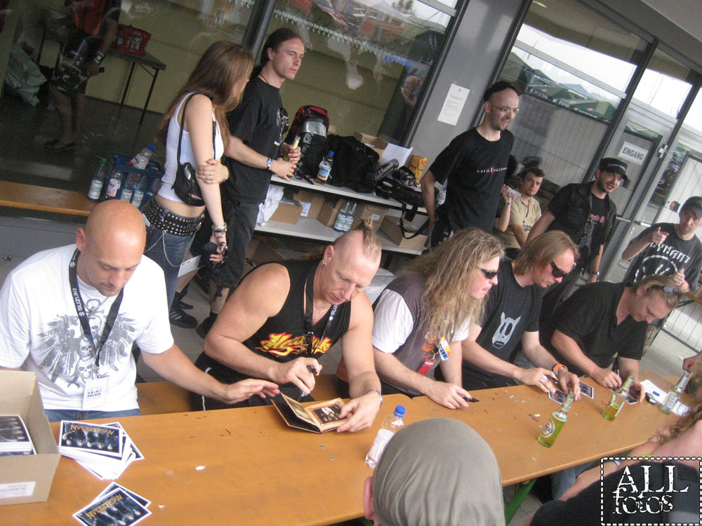 Masterplan Live @ Earthshaker Fest - 07/2007 - Kreuth bei Amberg, Alemanha